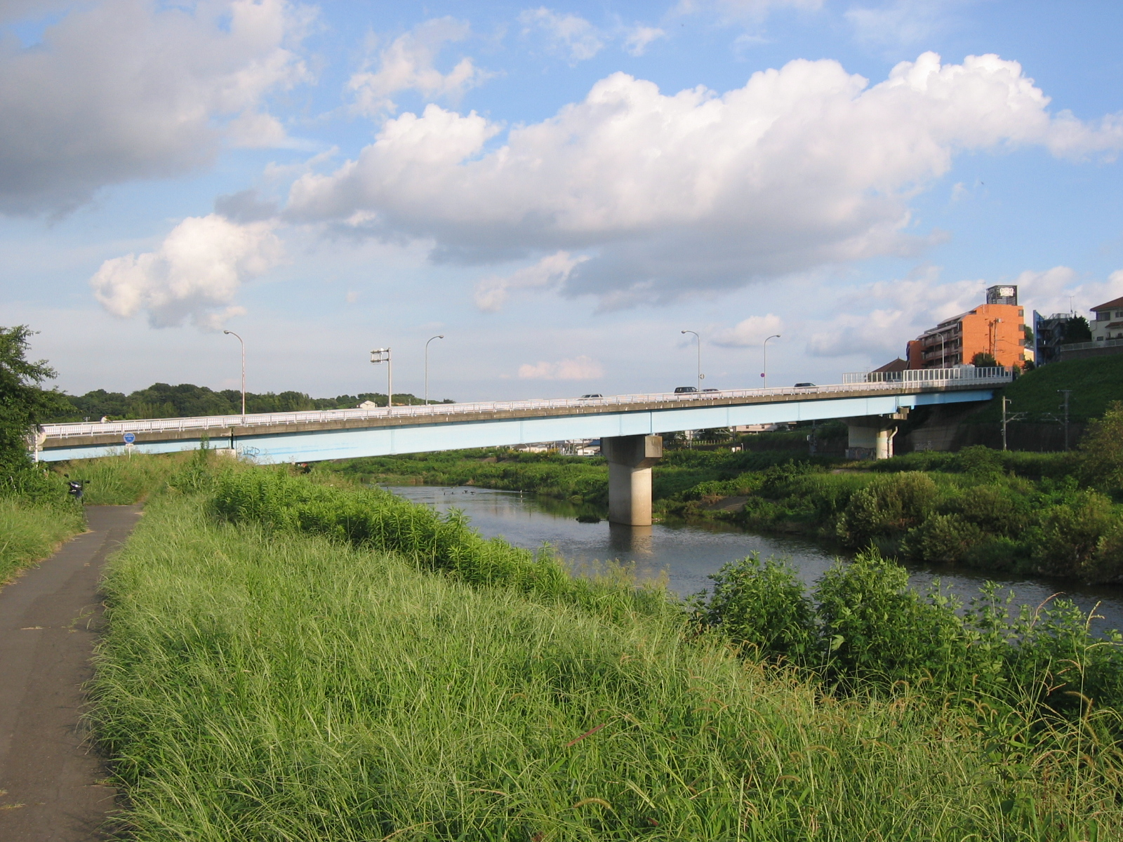 2006年8月21日、利用者自身の撮影。